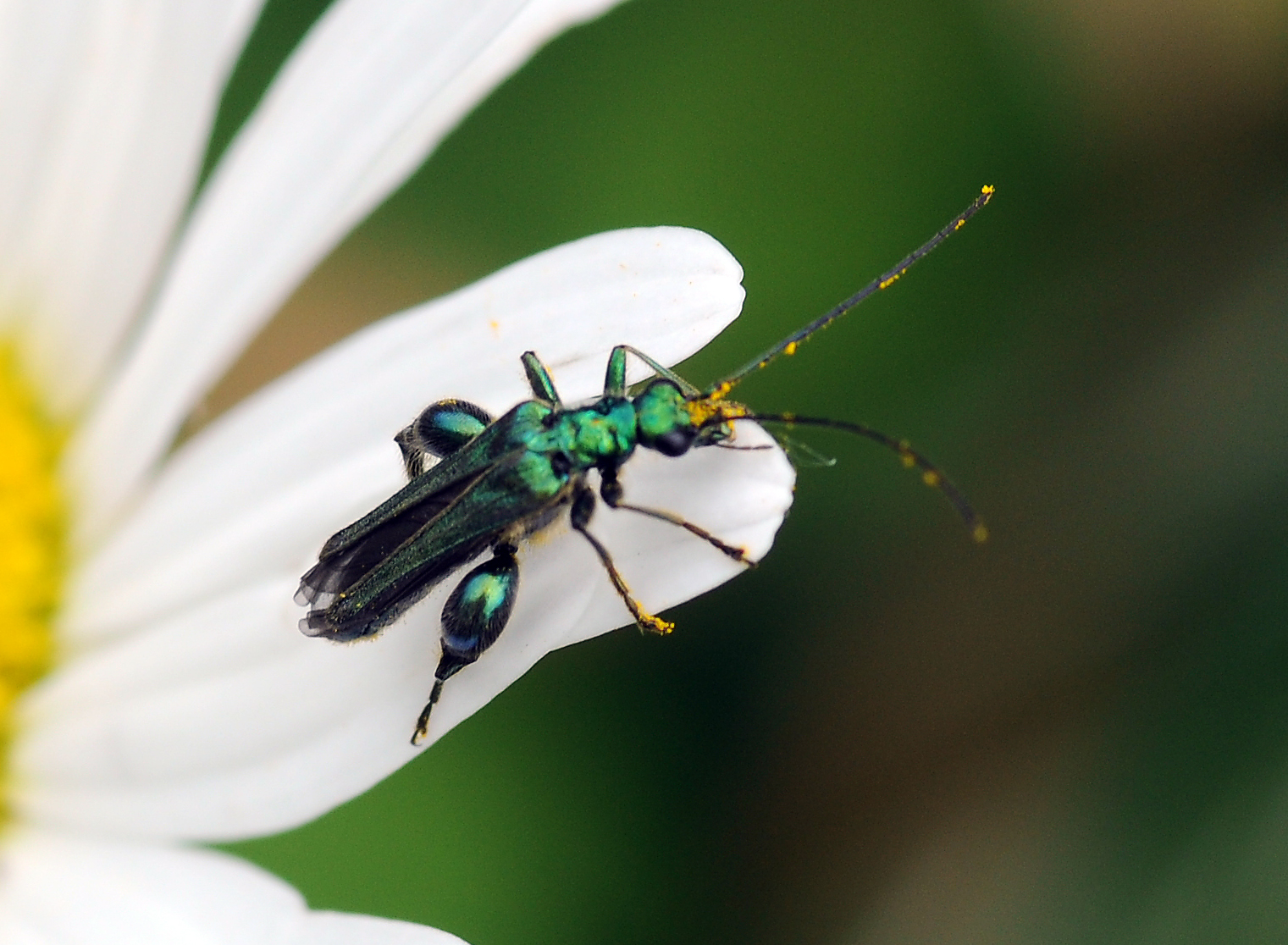 Oedemera nobilis